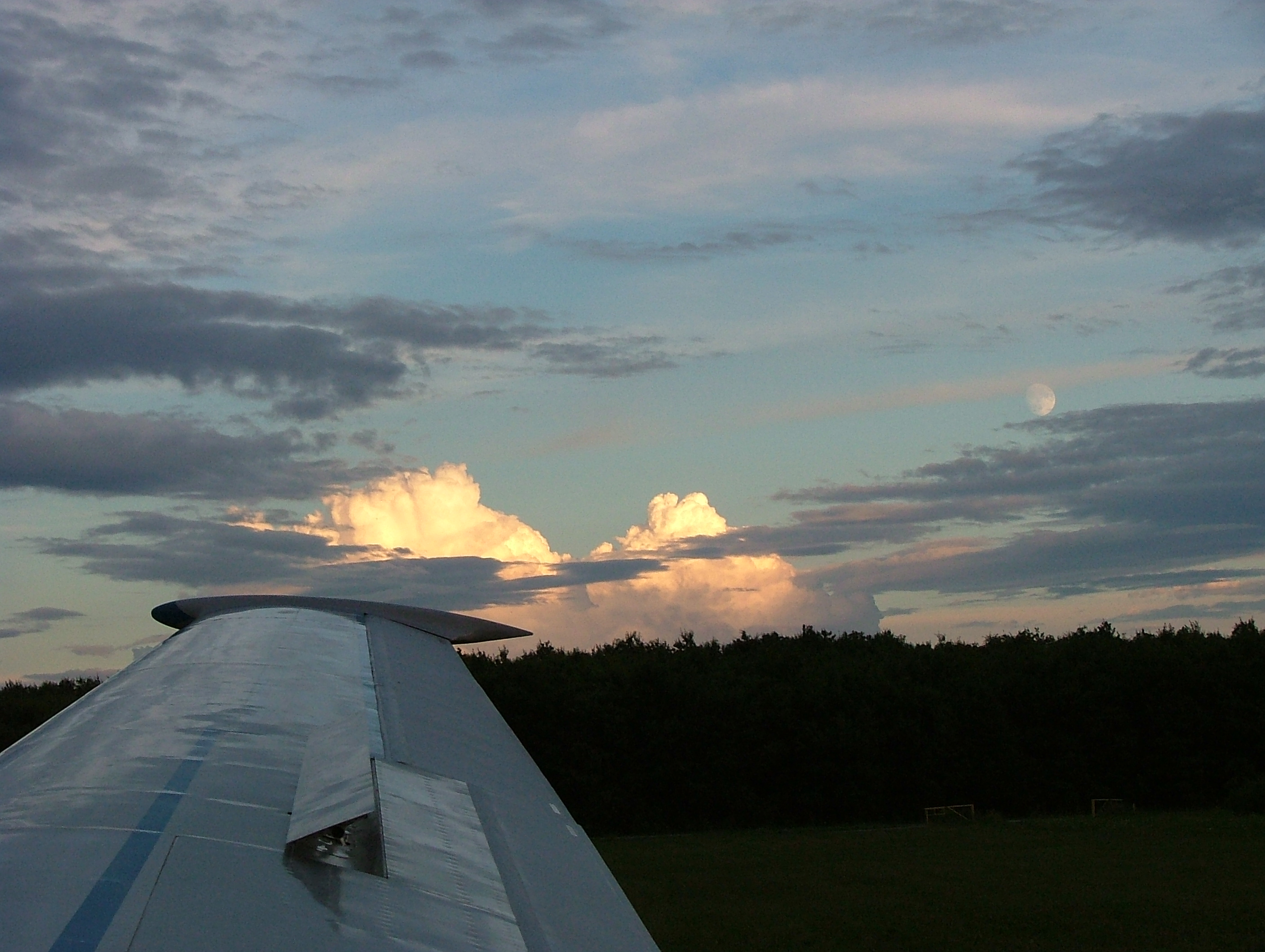 Spoiler